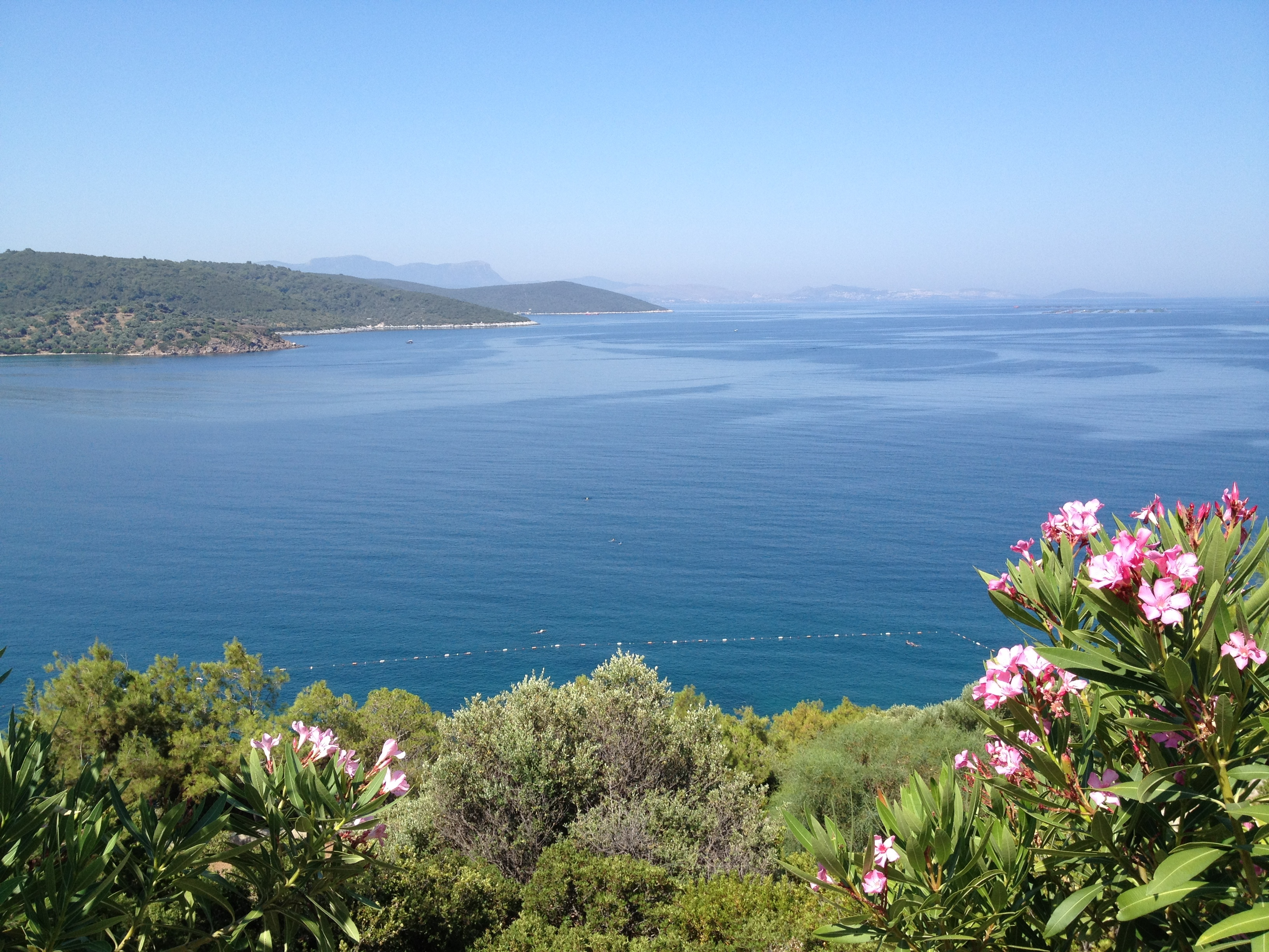 Dörttepe Evleri